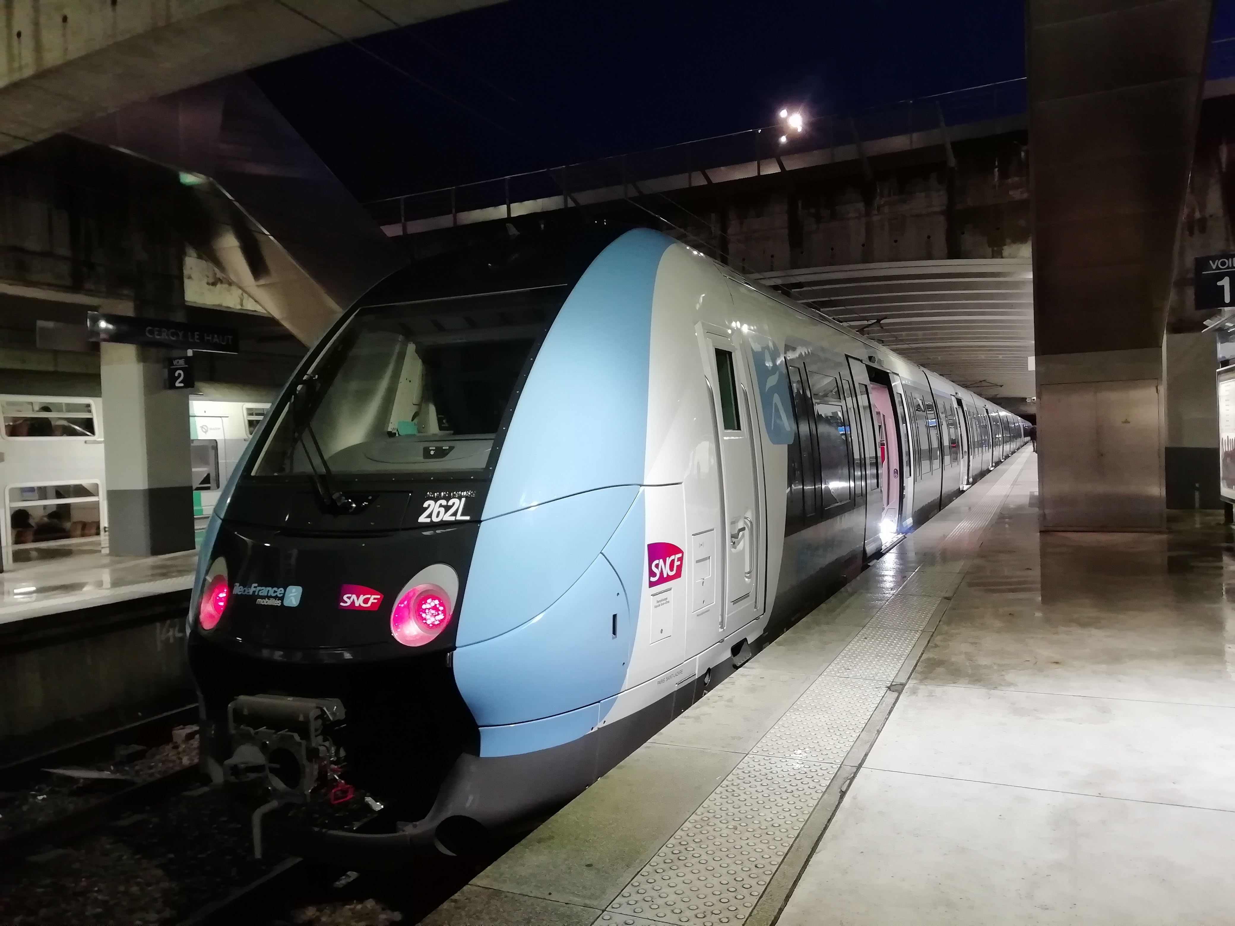 Rame Z 50000 n°262L en gare de Cergy-le-Haut.